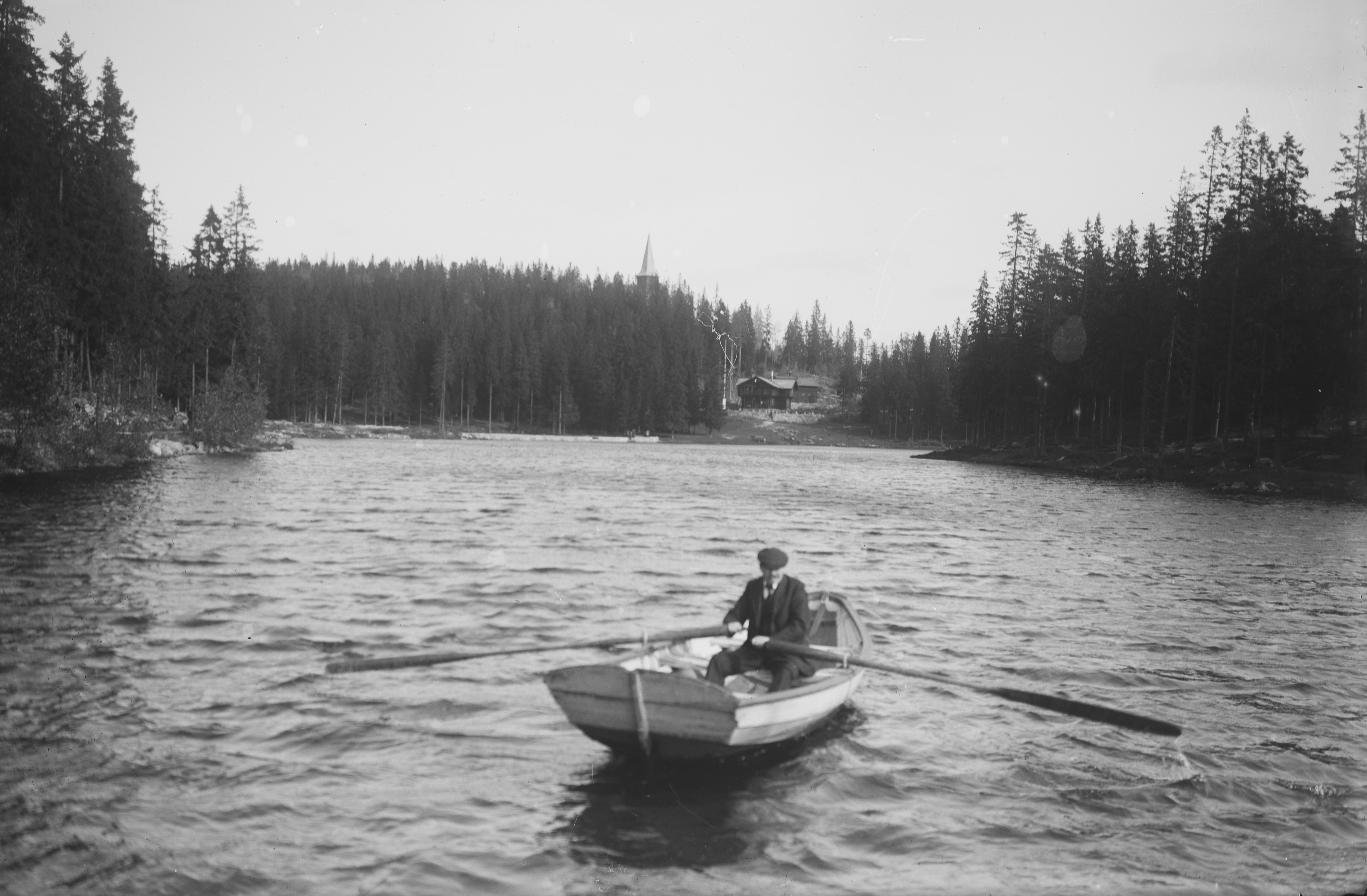 Bildet er hentet fra Nasjonalbibliotekets bildesamling. Anmerkninger til bildet var: Påskrift eske: Holmenkollen Påskrift arkivark: Besserudtjernet Holmenkollen Holmenkollen, Oslo, Oslo